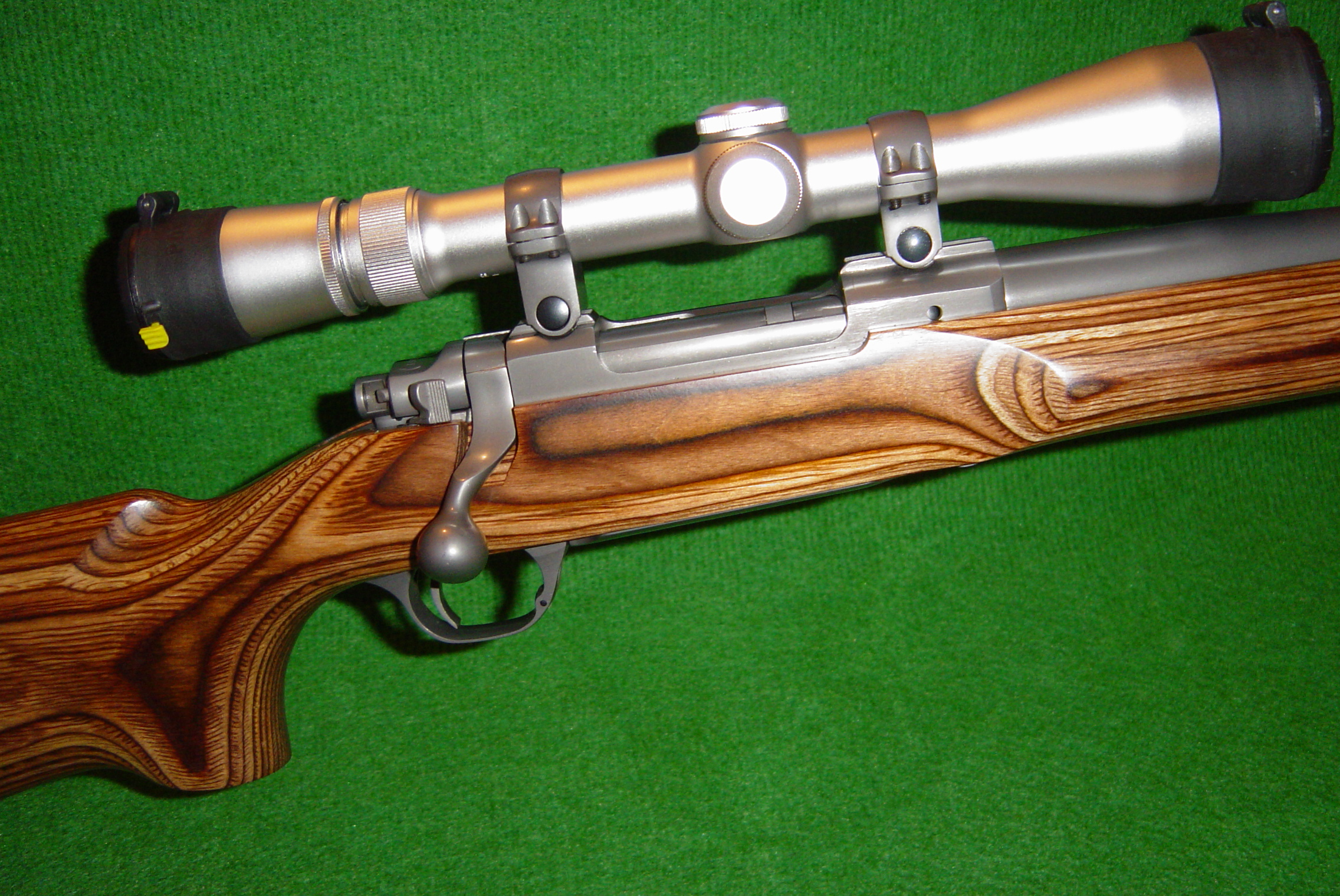 Carabine Varmint RUGER MK III Calibre 22 250 Remington lunette Weaver montage fixe